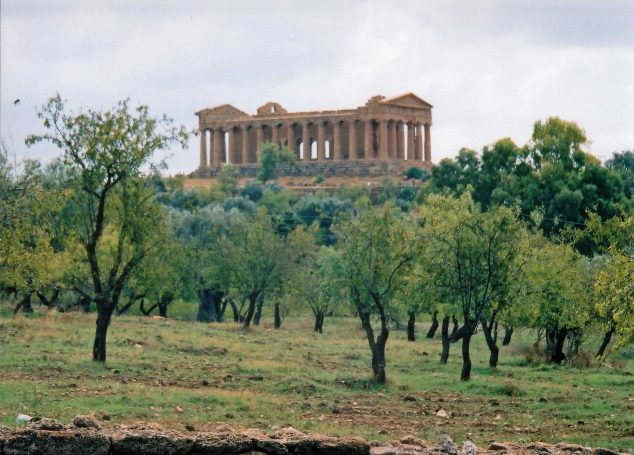 Tempio della Concordia ad AgrigentoTemple of Concord, Agrigento